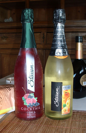 Stassen - Aubel - Belgium